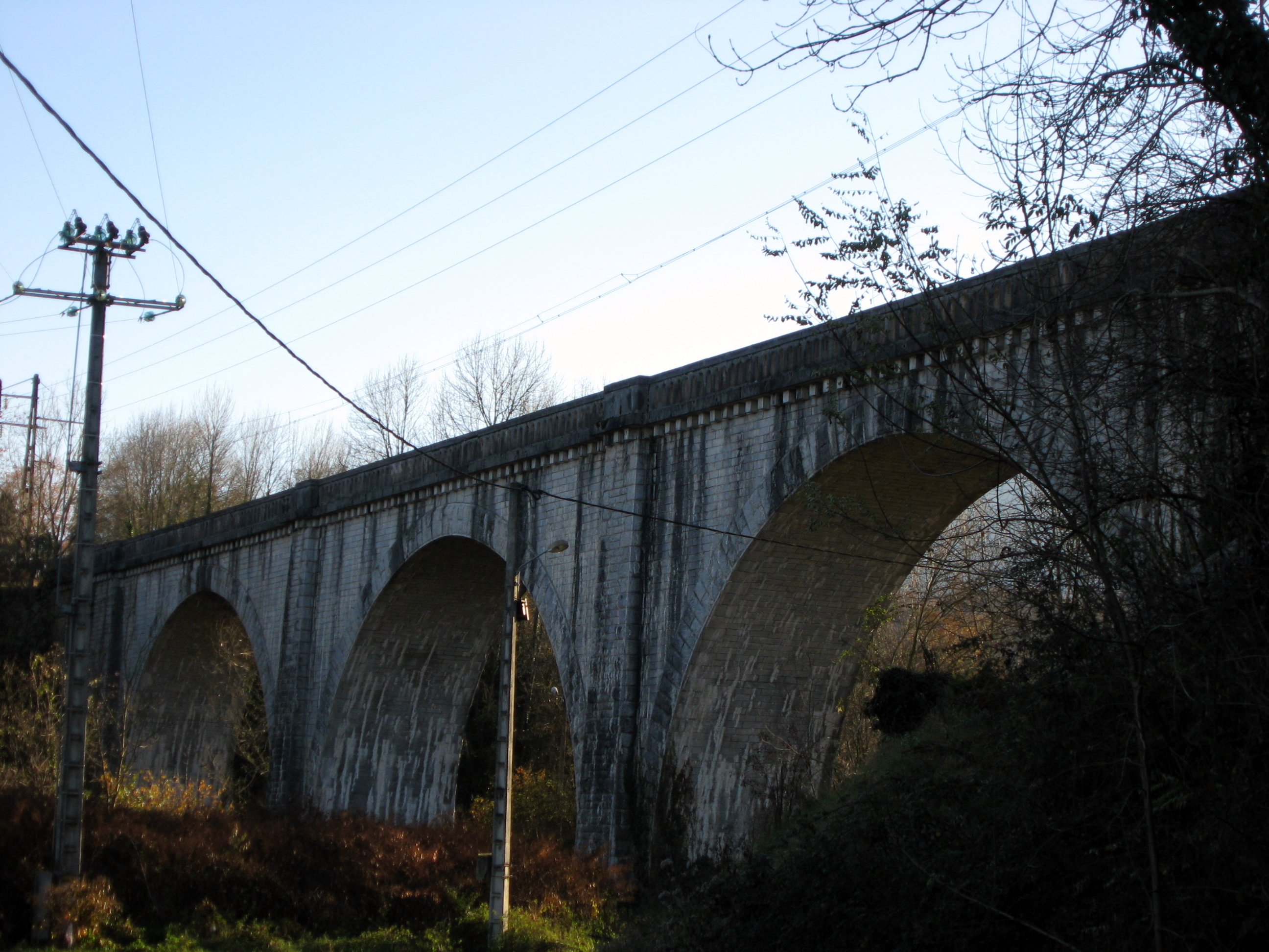 Pont de chemin de fer (ex. ligne Pau - Canfranc) (Pyrénées-Atlantiques) (Pyrénées).